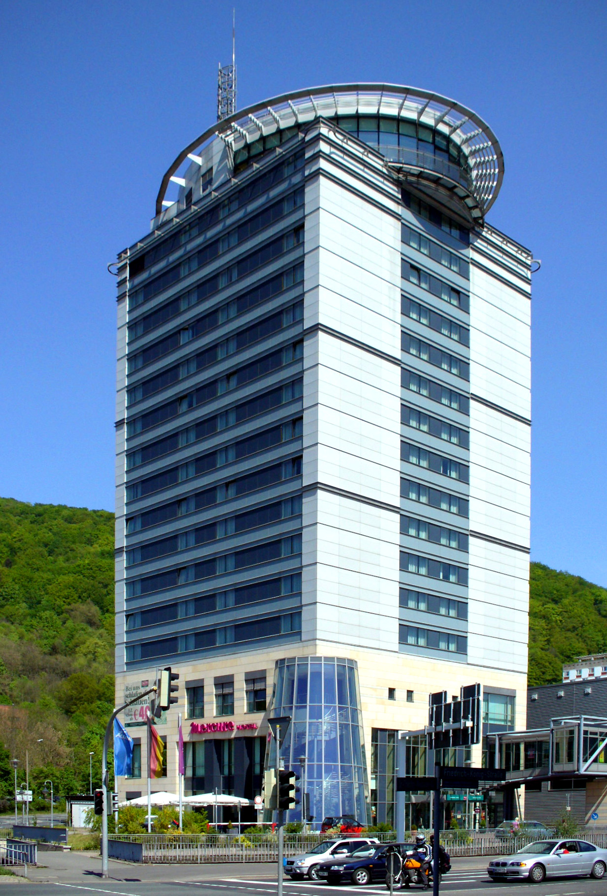 Mercure Hotel Kongress Suhl